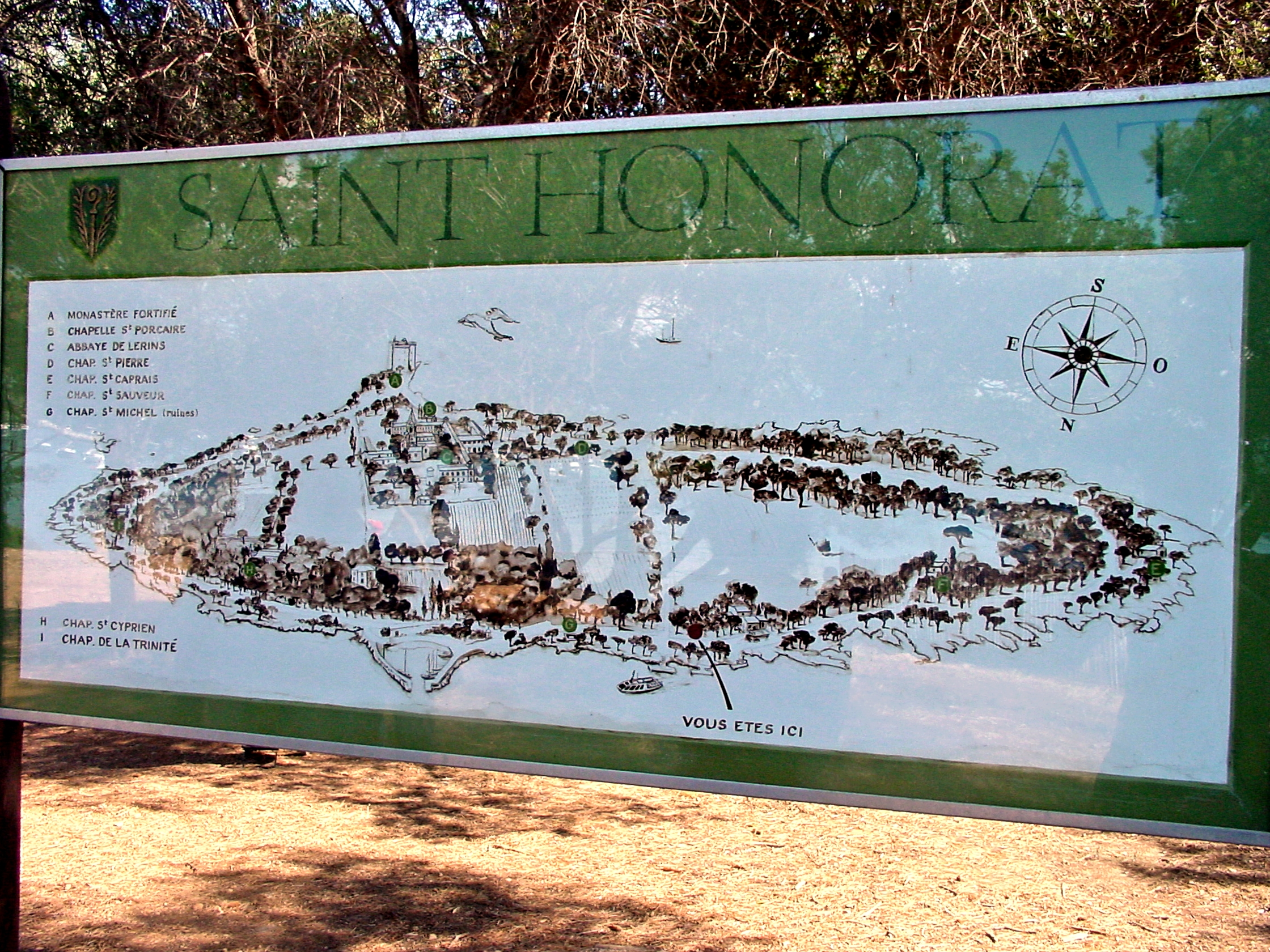 Sainthonoratkarte